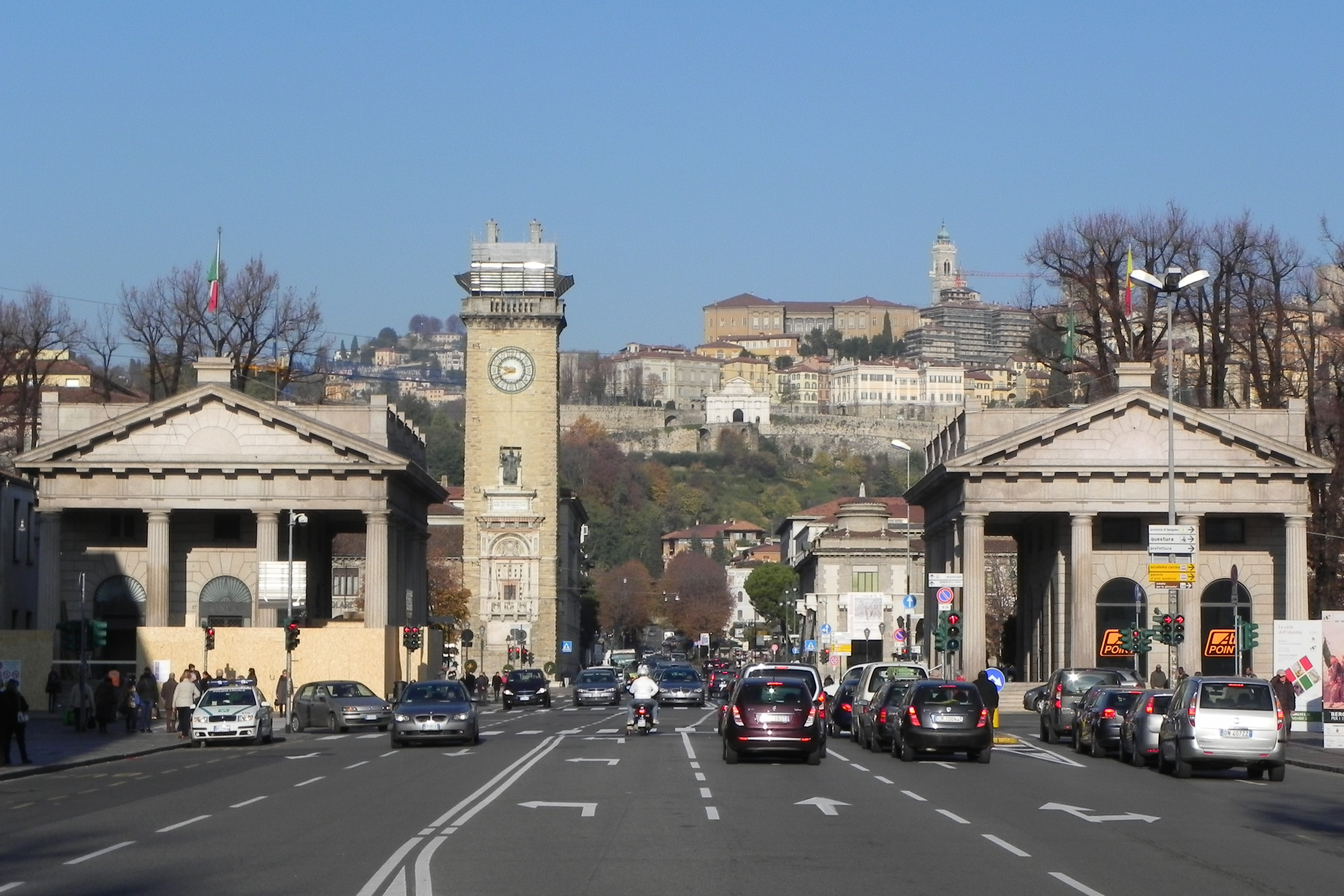 I propilei di Porta Nuova, a Bergamo